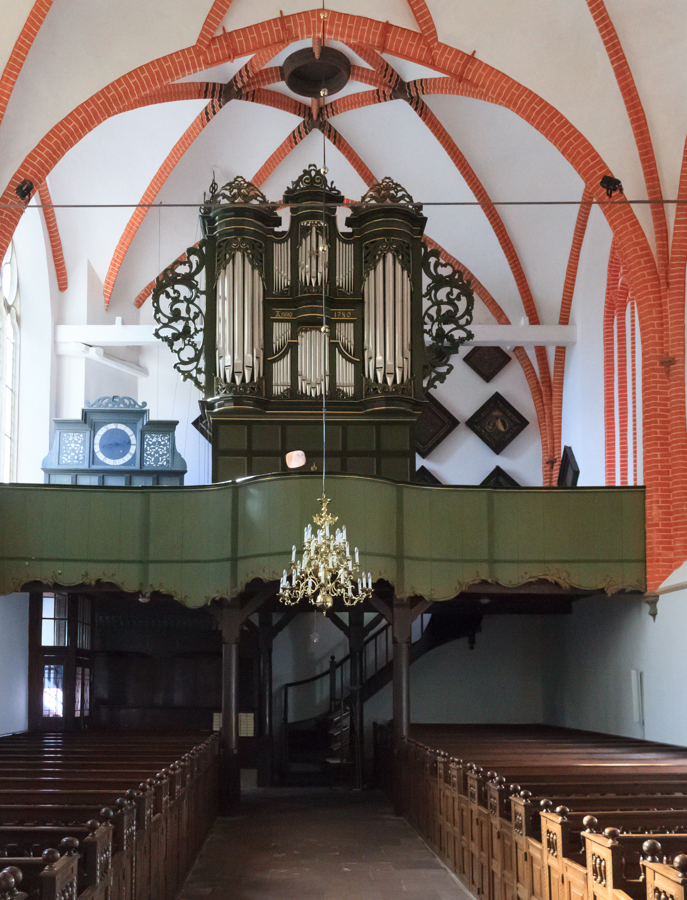 Innenraum der Hinter Kirche